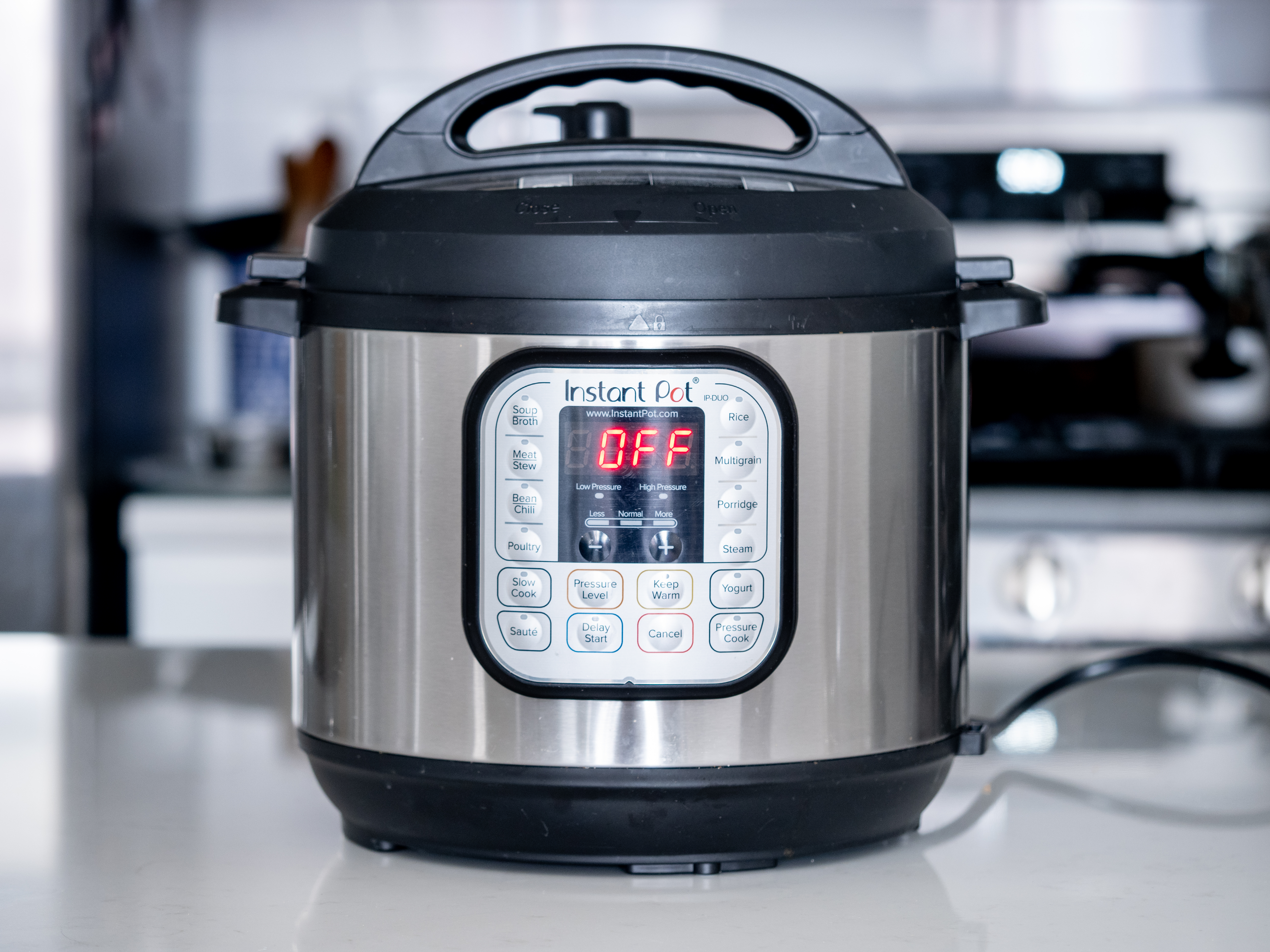 Instant Pot